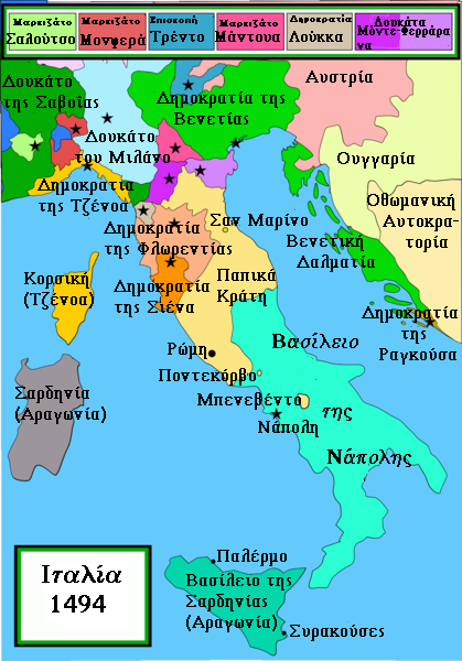 Η Ιταλία το 1494